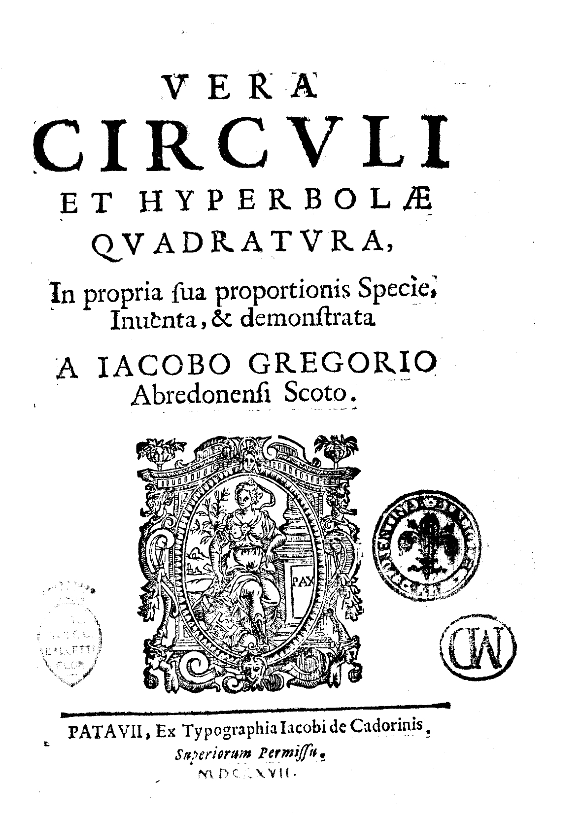 Vera circuli et hyperbolae quadratura, in propria sua proportionis specie, inuenta, & demonstrata a Iacobo Gregorio Abredonensi Scoto. - Patauii : Ex typographia Iacobi de Cadorinis, 1667. - 62, [2] p., [1] c. di tav. : ill. ; 4º .